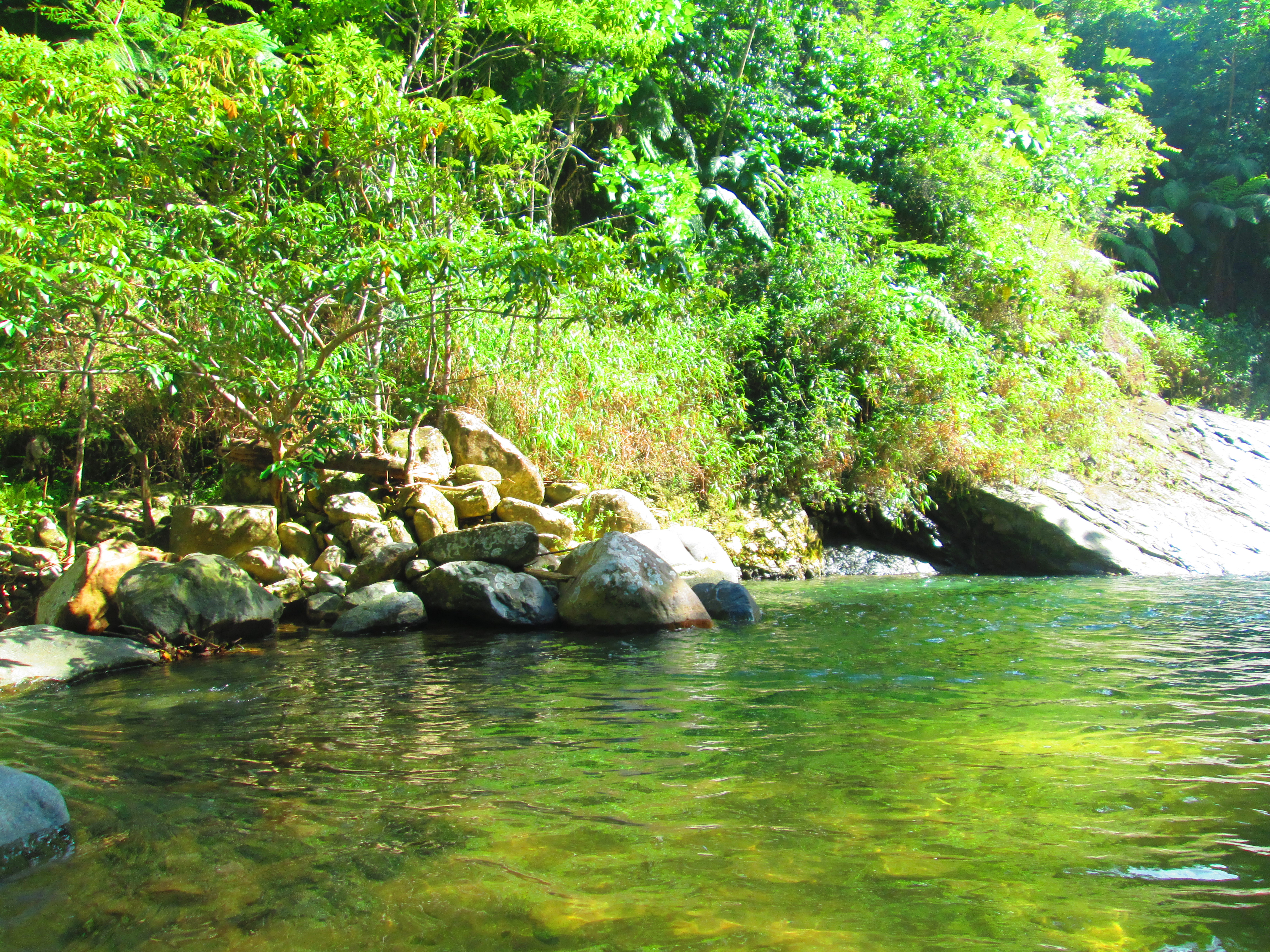 Quebrada el Diamante, paisaje caqueteño